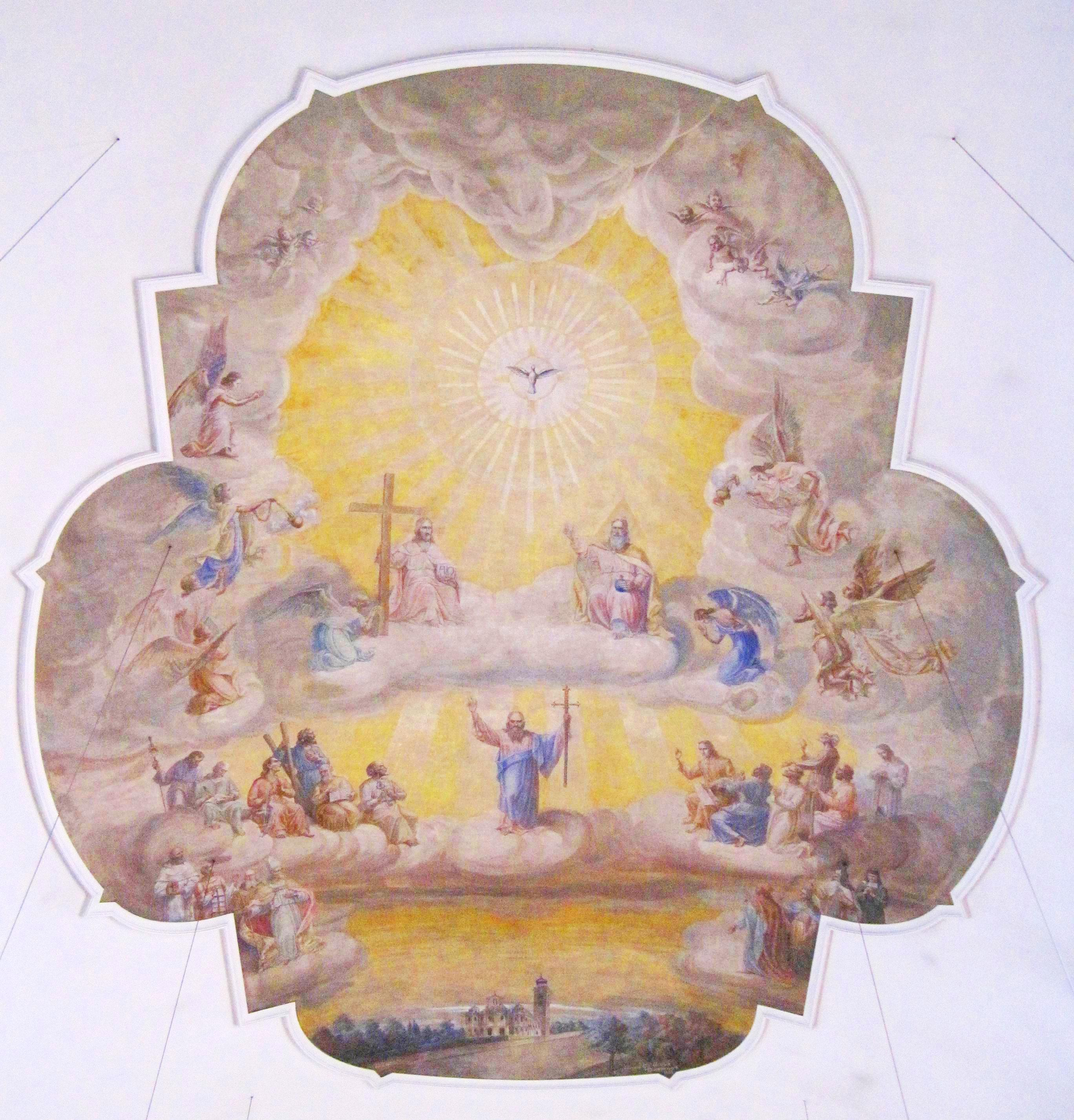 St. Paulus Göttingen Deckengemälde Eduard Goldkuhle 1936 Apotheose des Paulus